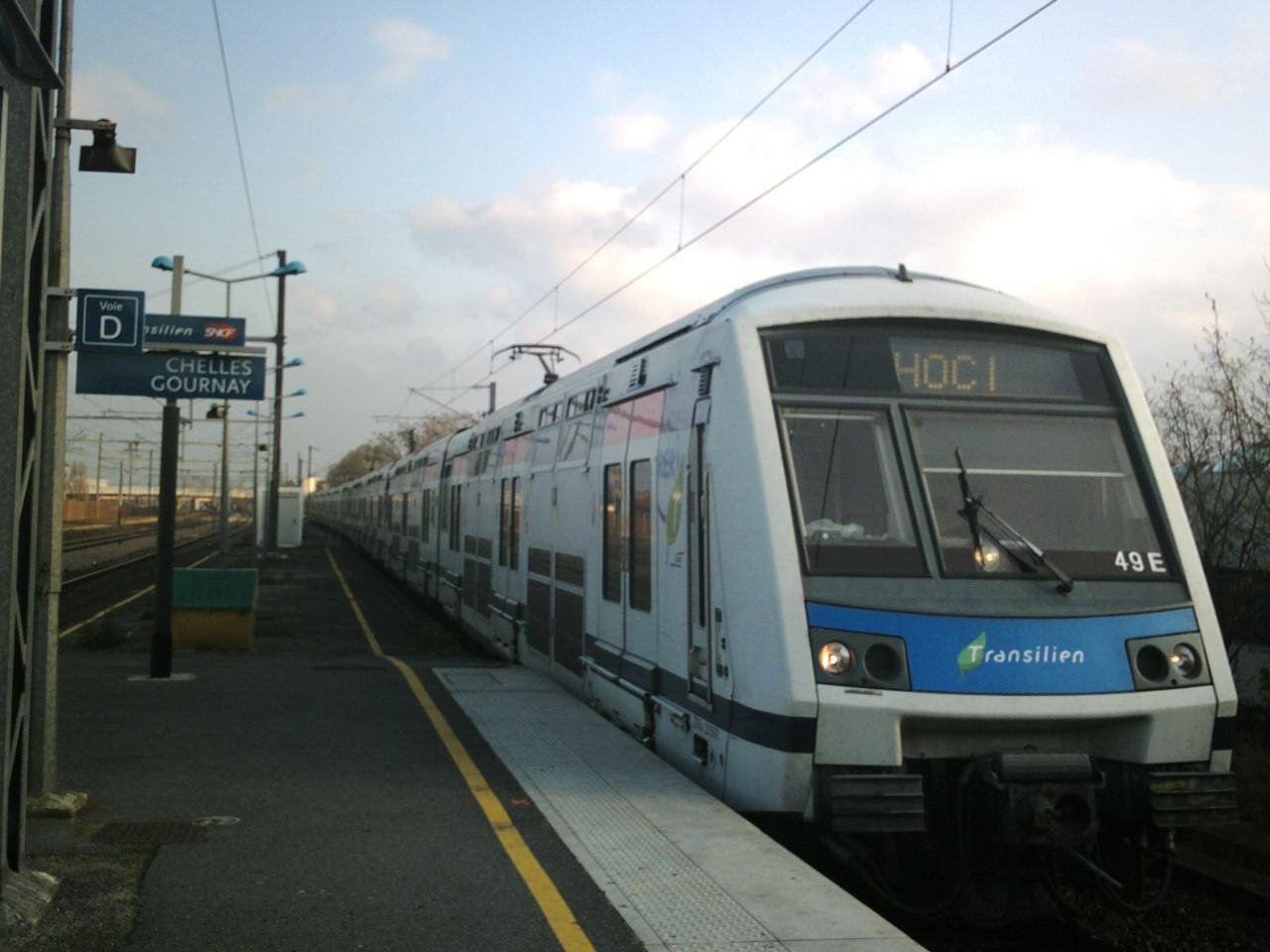 Train HOCI en gare d'origine de Chelles